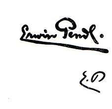 Erwin Pendl Signatur